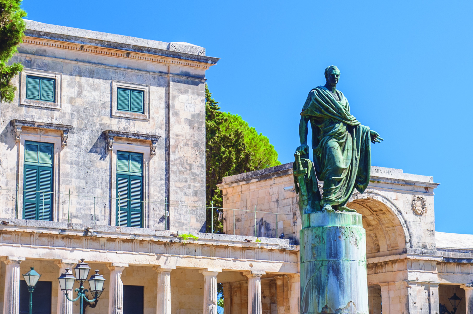 Άγαλμα του σερ Φρέντερικ Άνταμ στην πόλη της Κέρκυρας.